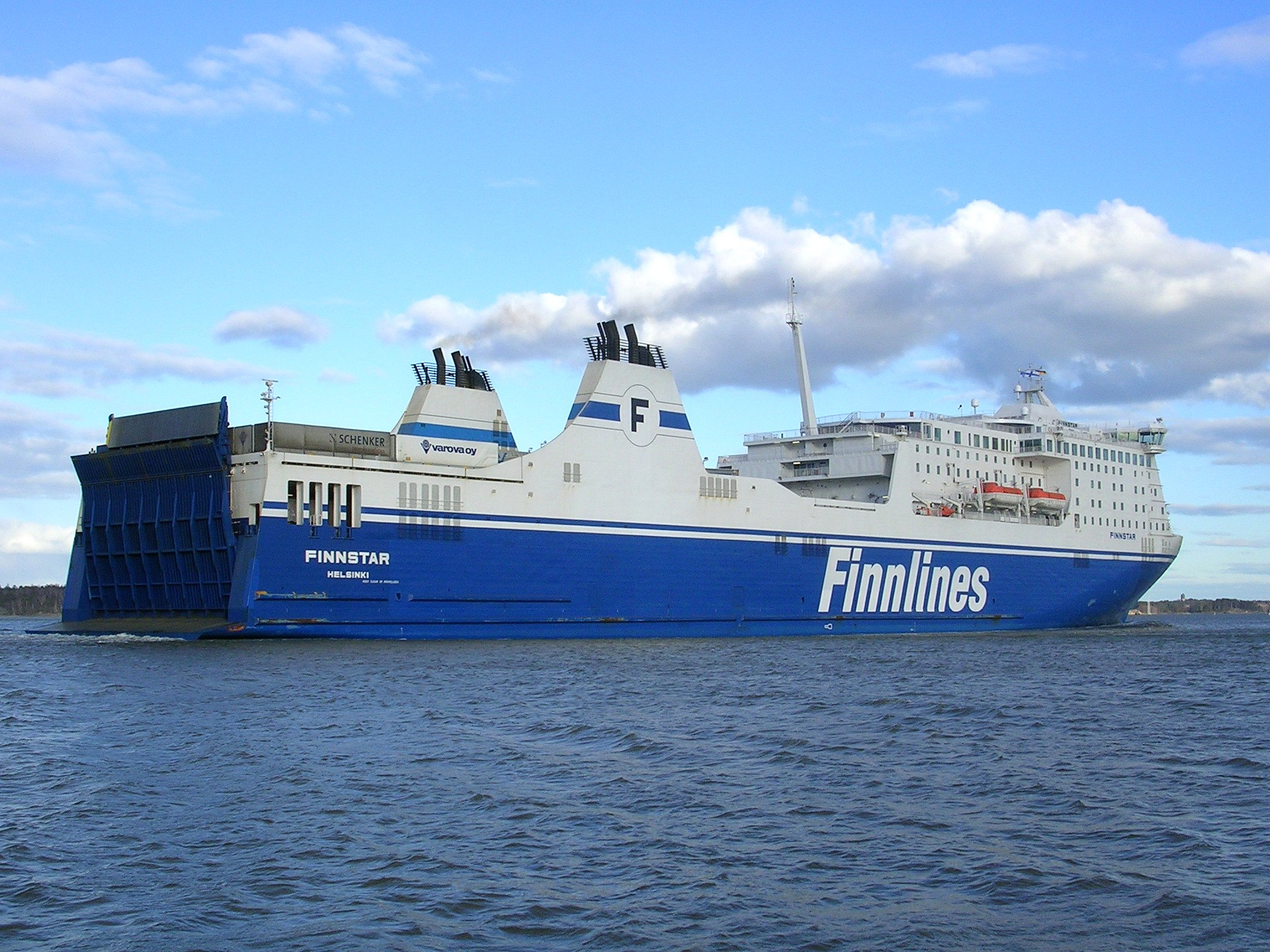 M/S Finnstar departing Sompasaari Harbour, Helsinki for Travemünde on 3rd April 2007. Picture taken by Kalle Id.